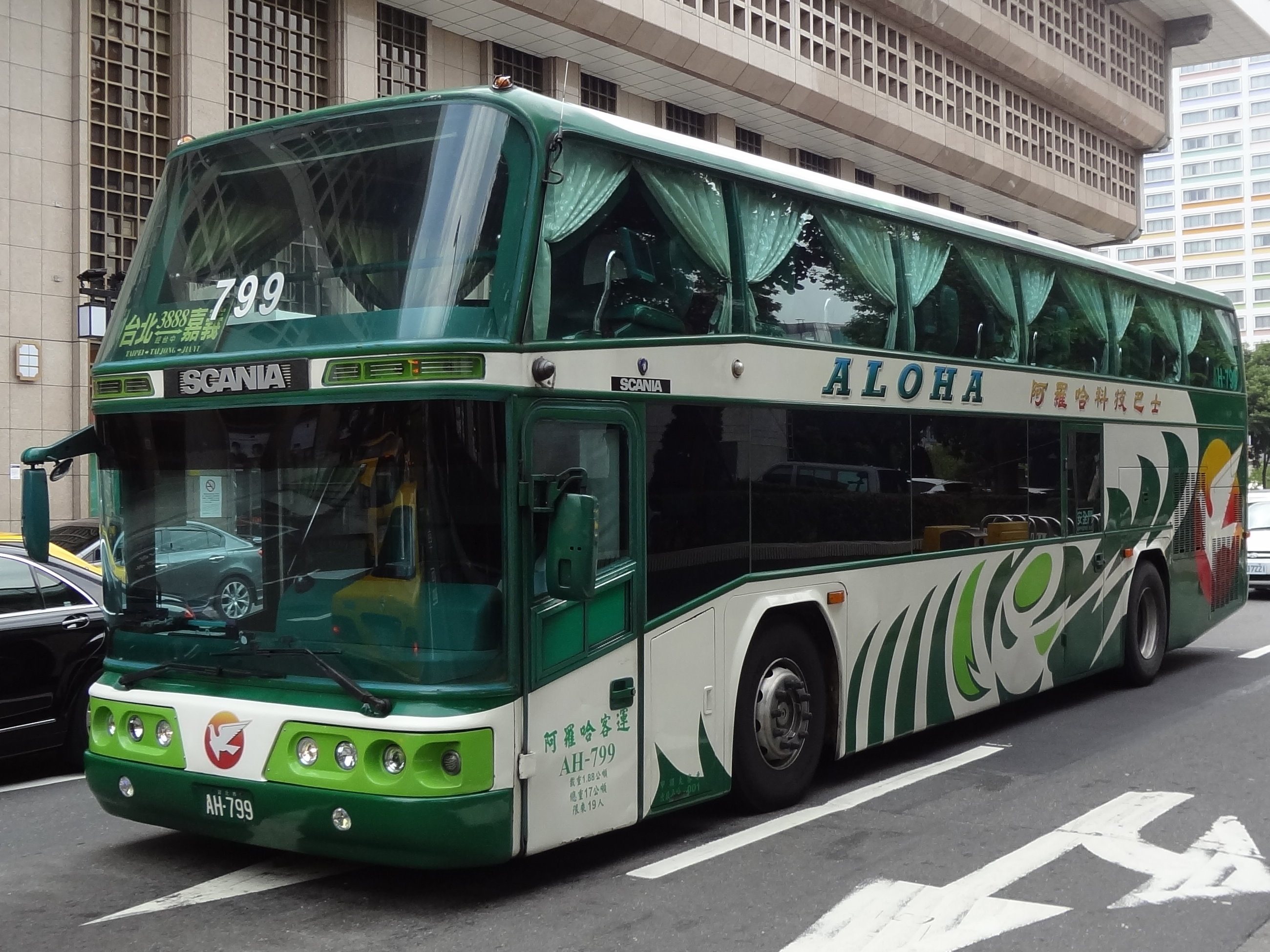 阿羅哈客運2001年Scania K114大客車AH-799。